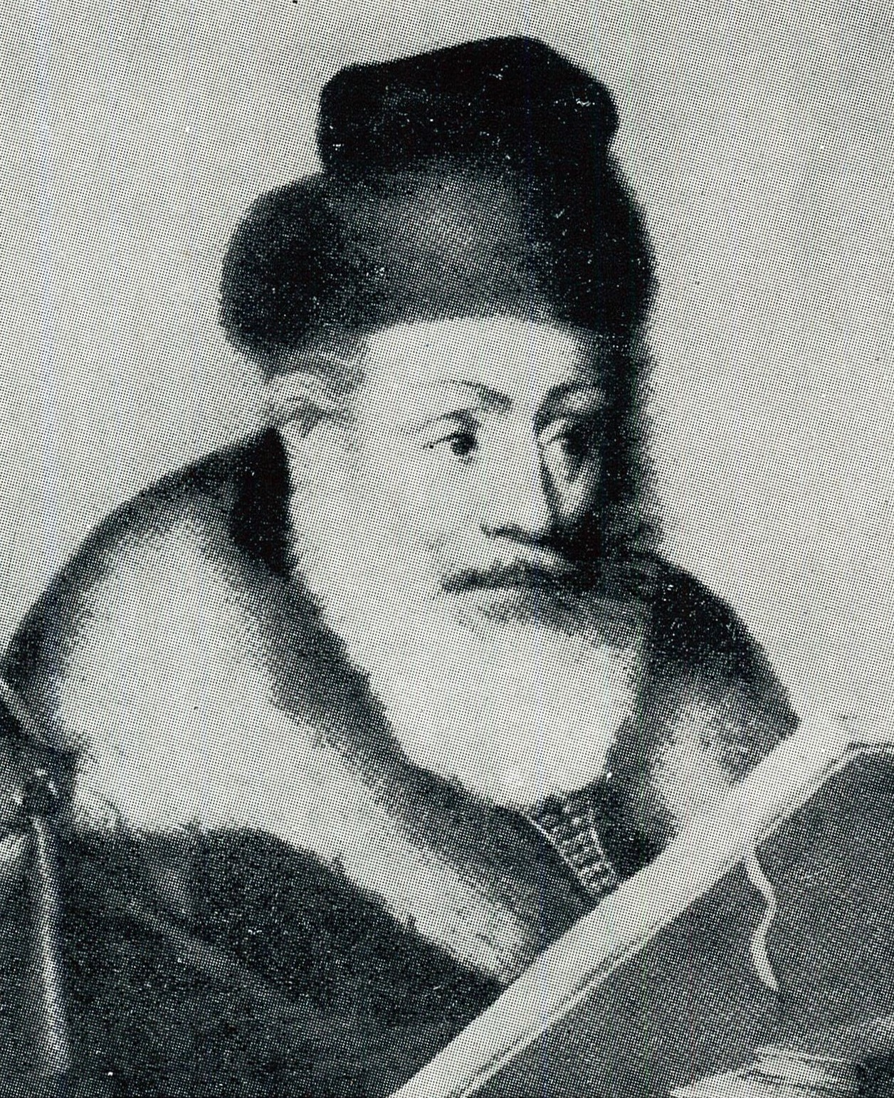 תמונה נפוצה של רבי עקיבא איגר